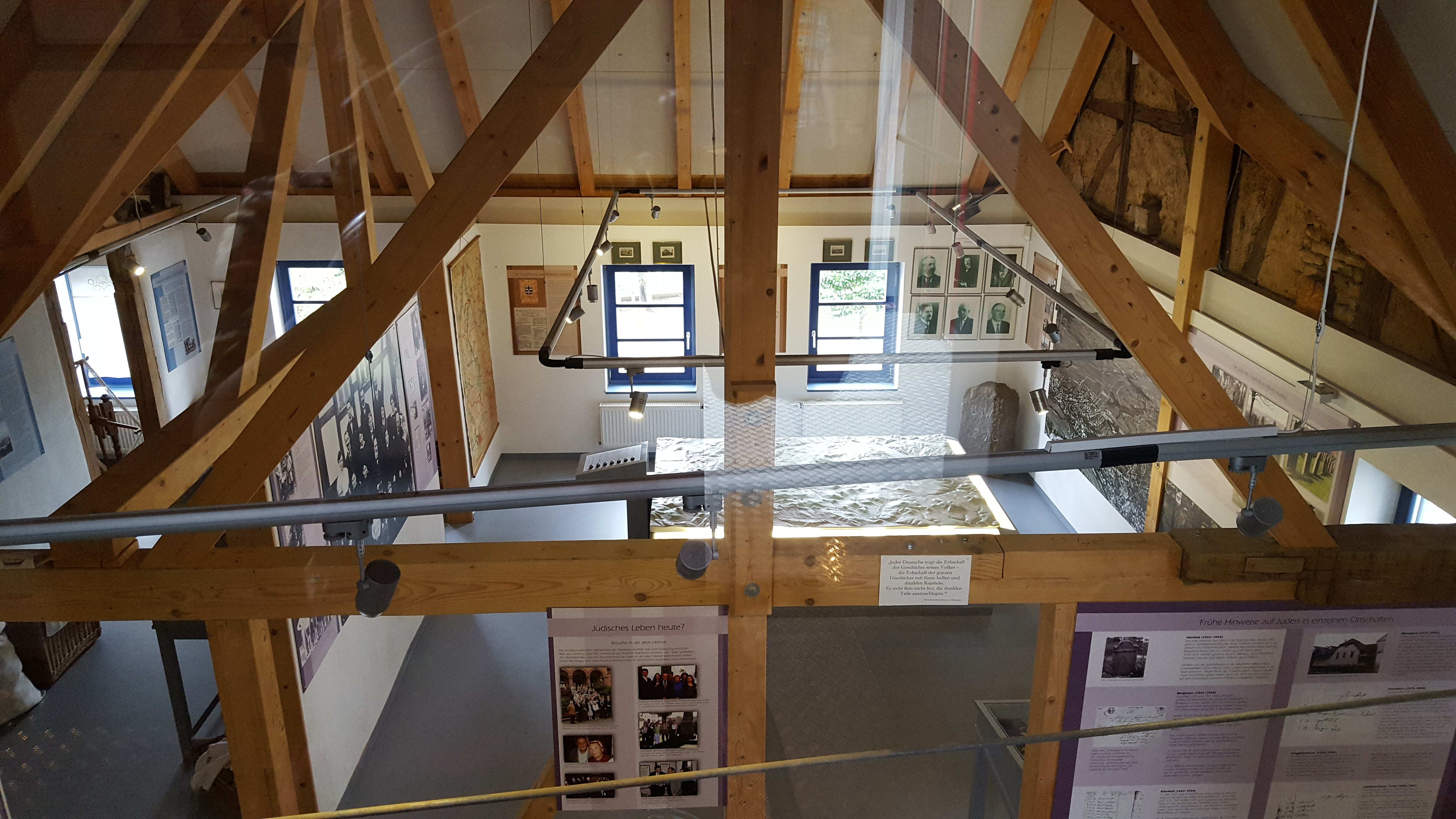 Blick auf die Abteilung "Juden im Kreis" des Konrad-Zuse-Museum Hünfeld mit Stadt- und Kreisgeschichte